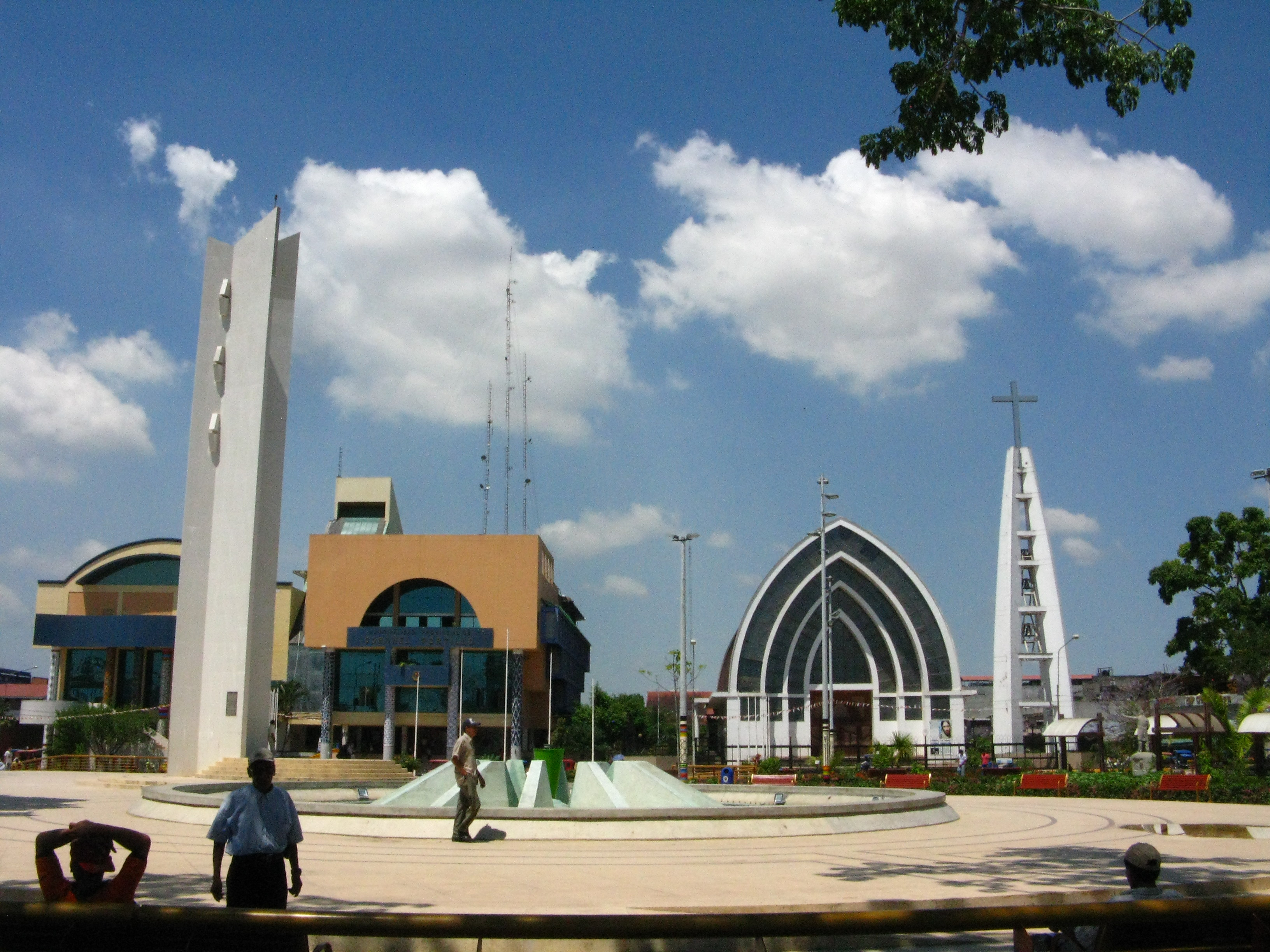 Plaza de Armas, Zentrum von Pucallpa, 2014, Hauptstadt der Region Ucayali, Peru